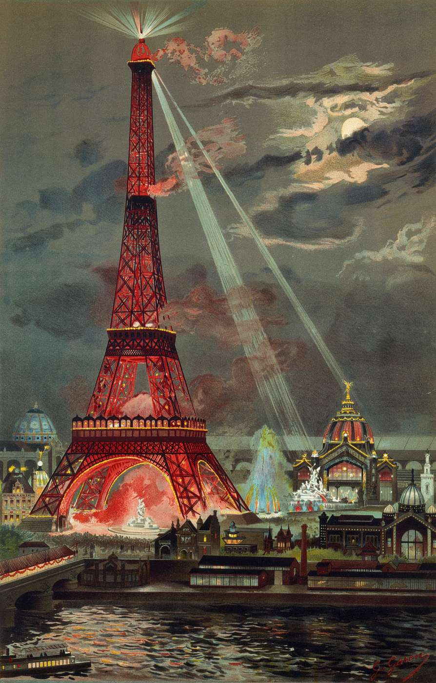 Tableau de Georges Garen peint en 1889 intitulé « Embrasement de la Tour Eiffel pendant l’Exposition universelle de 1889 ».